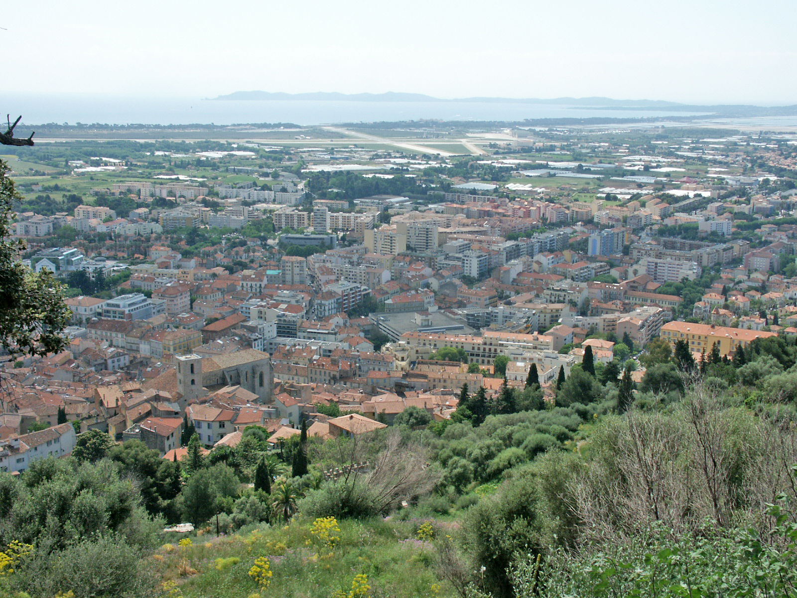 Hyères, vue prise du château en direction du sud. On aperçoit sur la gauche une partie de la vieille ville avec l'église Saint-Paul. En arrière-plan, les pistes de l'aéroport de Toulon-Hyères, sur la droite, la presqu'île de Giens et tout au fond l'île de Porquerolles.